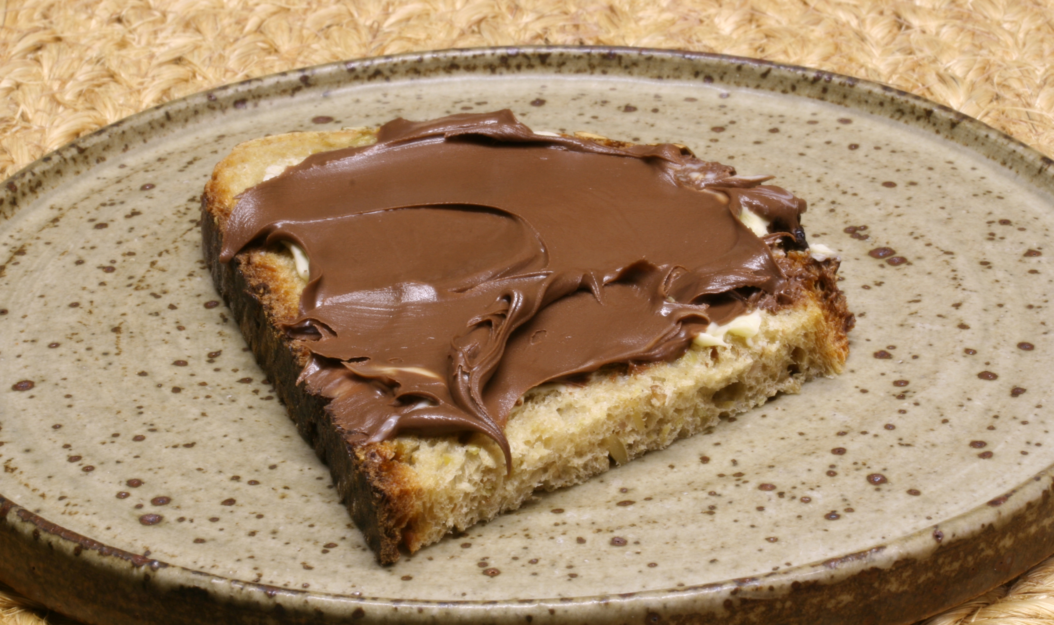 Schockelasbotterschmier.